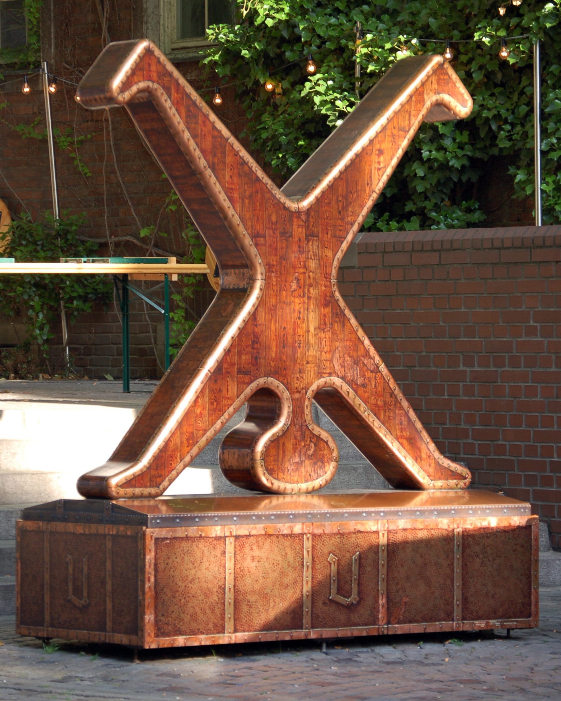 Düsseldorfer Radschläger, Figur vor dem Brauereiausschank Uerige